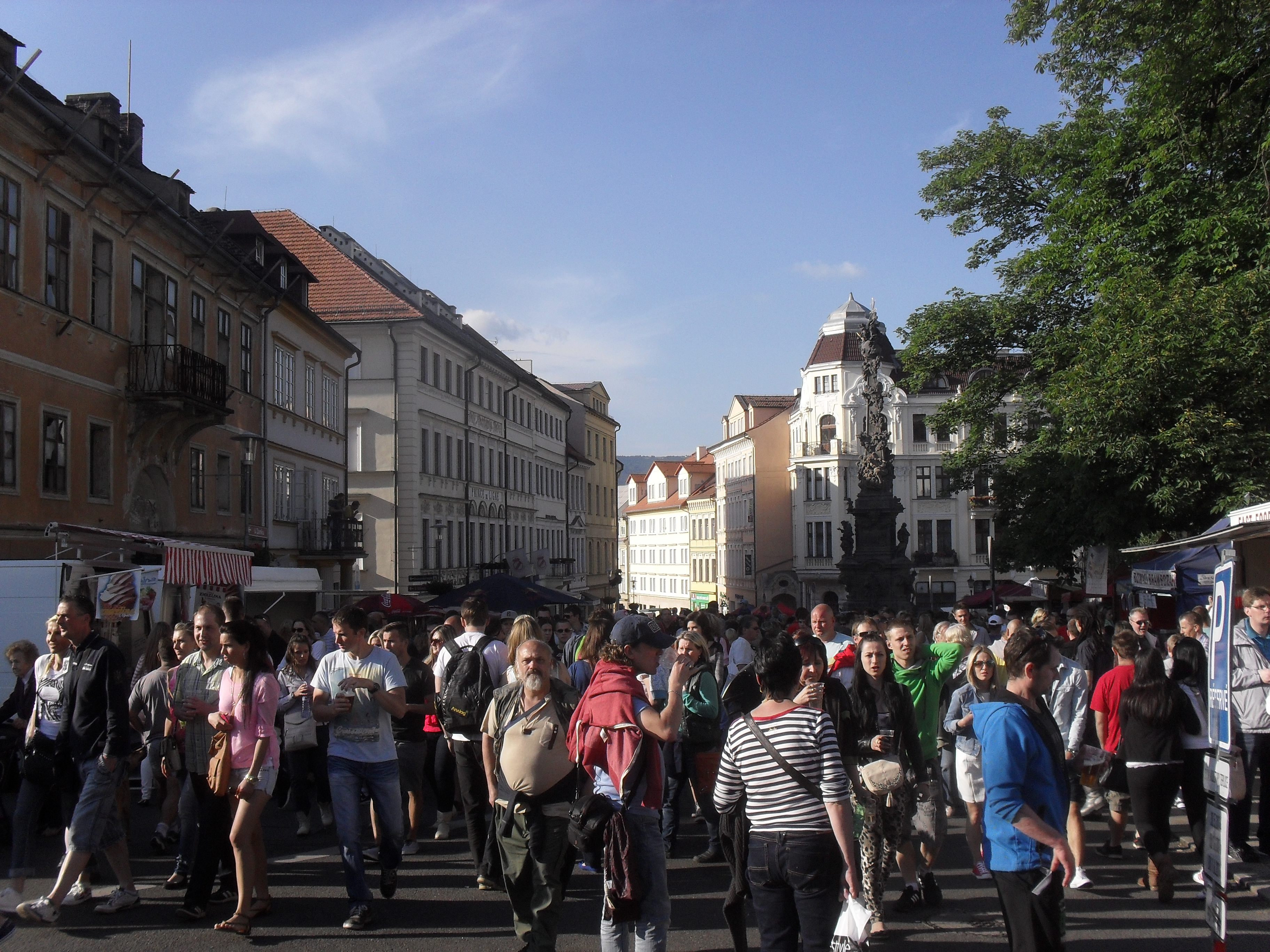 860. zahájení lázeňské sezóny v Teplicích, fotografie z prvního dne.